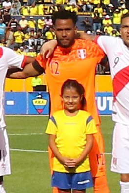 Quito 5 Sep (Andes).- Encuentro por eliminatorias Rusia 2018 entre Ecuador y Perú. Fotografías: Carlos Rodríguez/Andes.